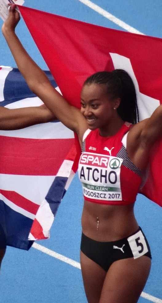 Młodzieżowe Mistrzostwa Europy w Lekkoatletyce U23 w Bydgoszczy 13-16 lipca 2017, finał biegu na 200 m kobiet